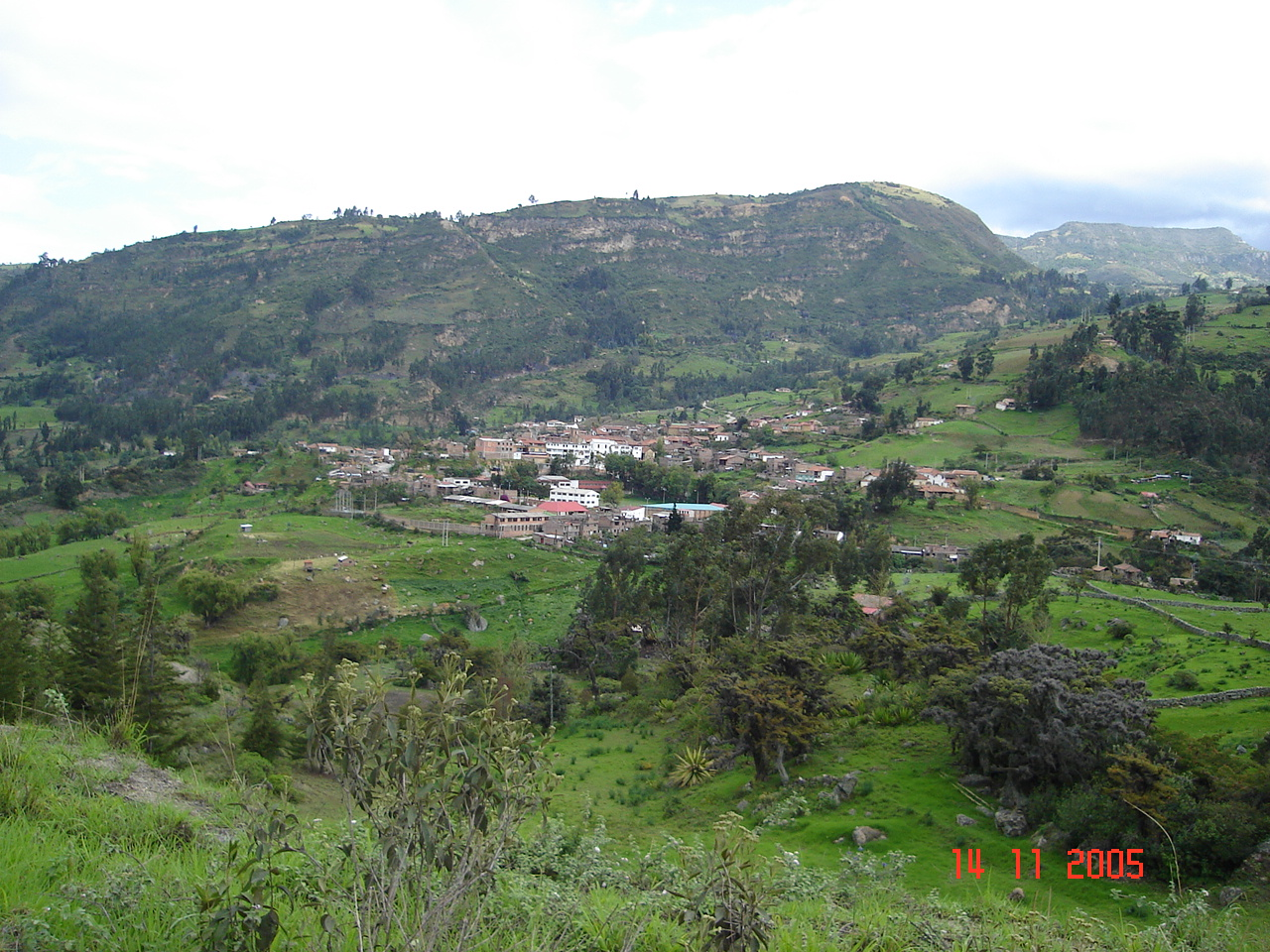 Vista panorámica de área urbana del municipio de Tasco, Boyacá, Colombia desde la entrada sur